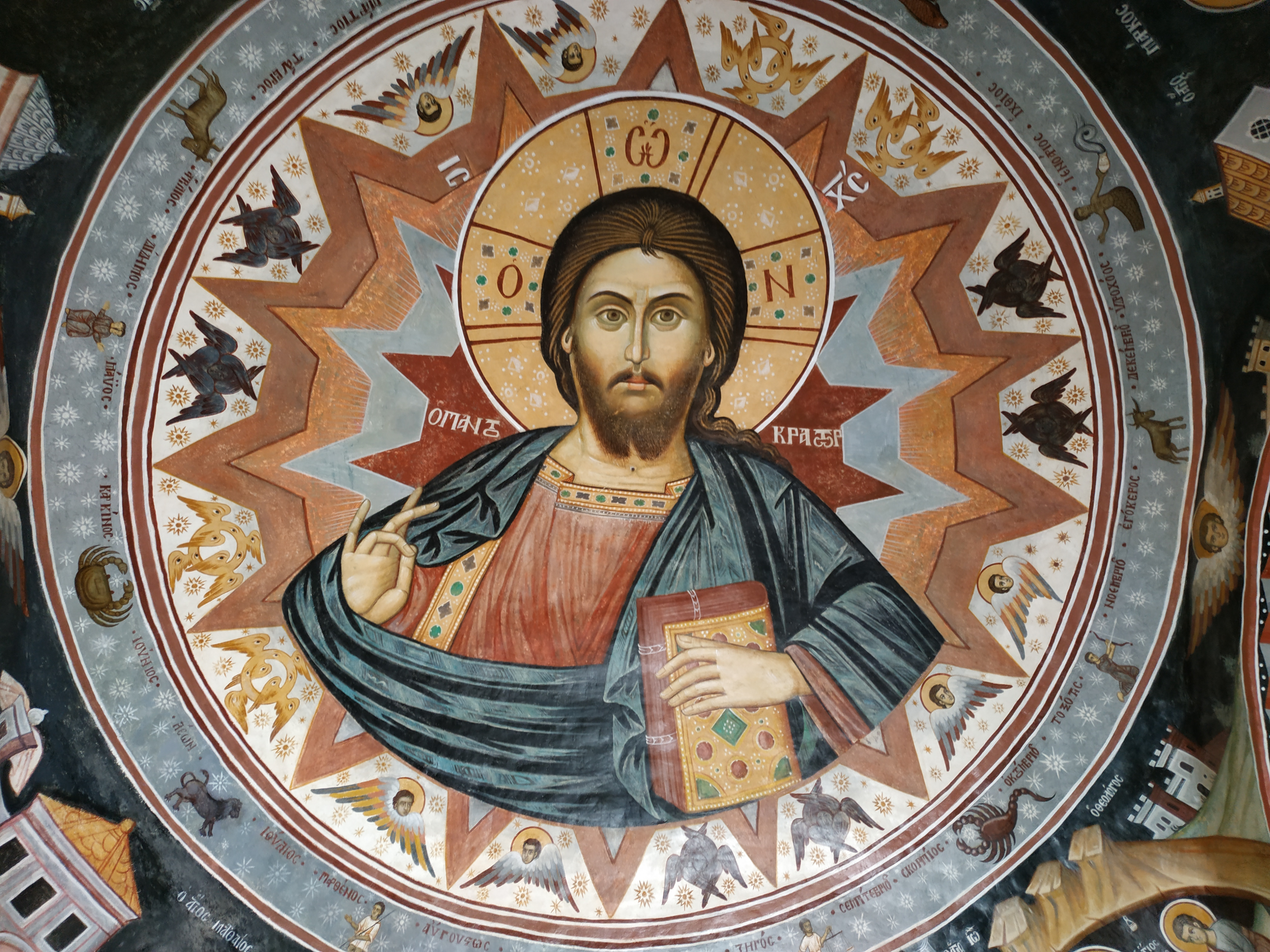 ікона в монастирі Дохіар Афон